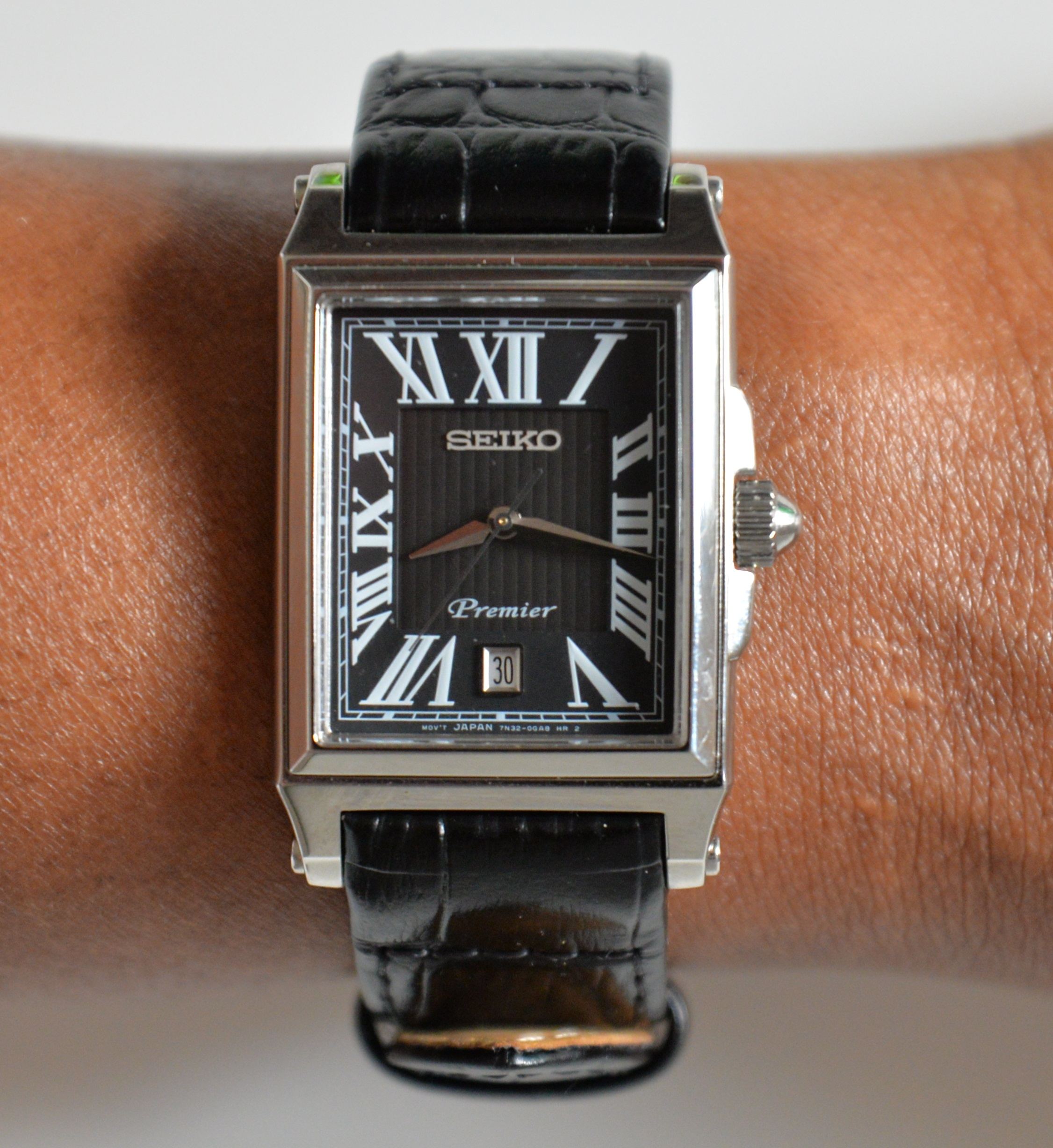 La collection Premier pour homme comprend des calibres quartz et mécaniques, mais surtout une gamme de montres Kinetic, notamment la remarquable Kinetic Direct Drive, une montre alimentée par le mouvement qui indique le transfert d’énergie en temps réel.